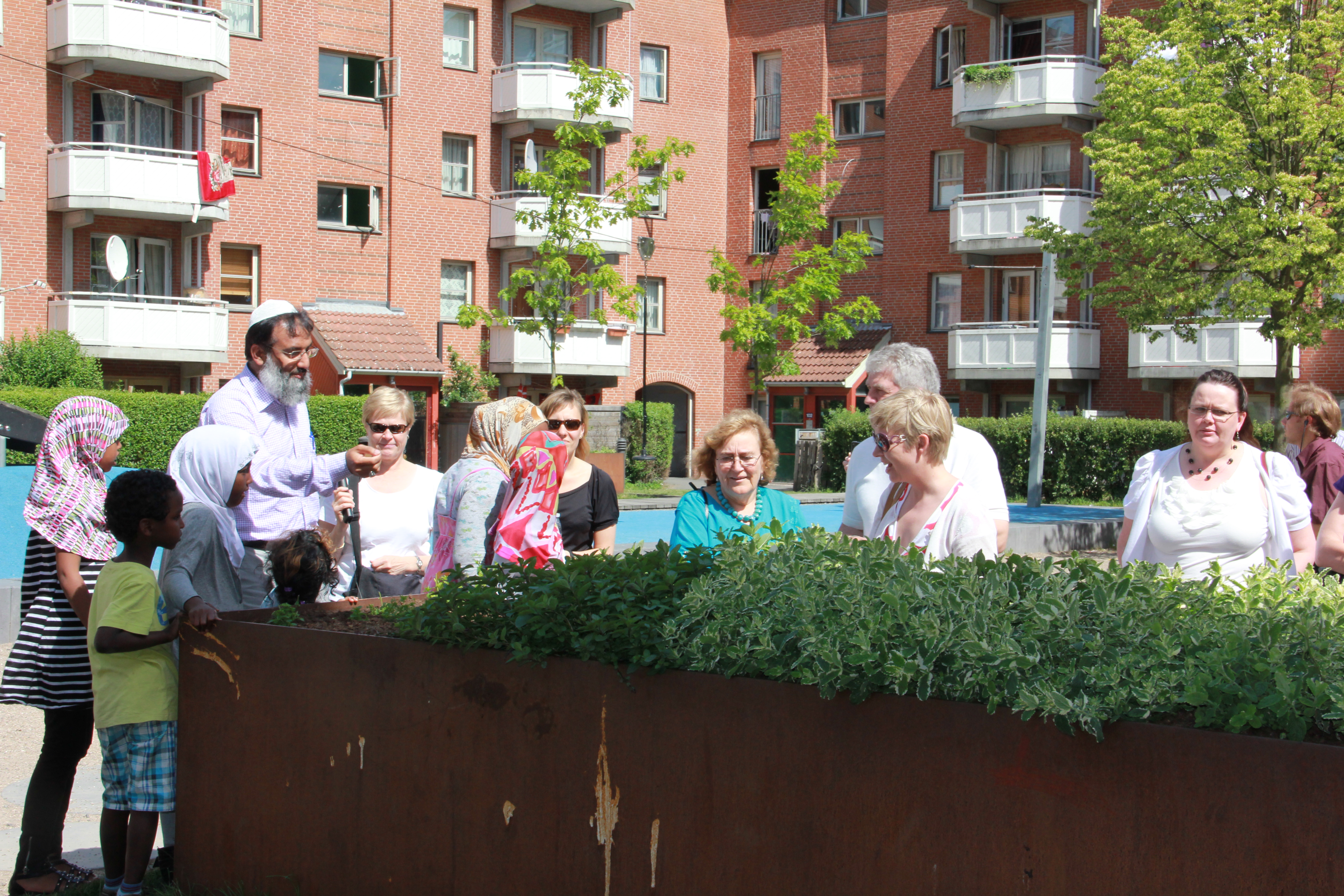 Janni Milsted fra Mjølnerparken i København viser et projekt frem, hvor beboerne har været med til at plante krydderurter og bærbuske i store kasser i de fire gårde i Mjølnerparken.